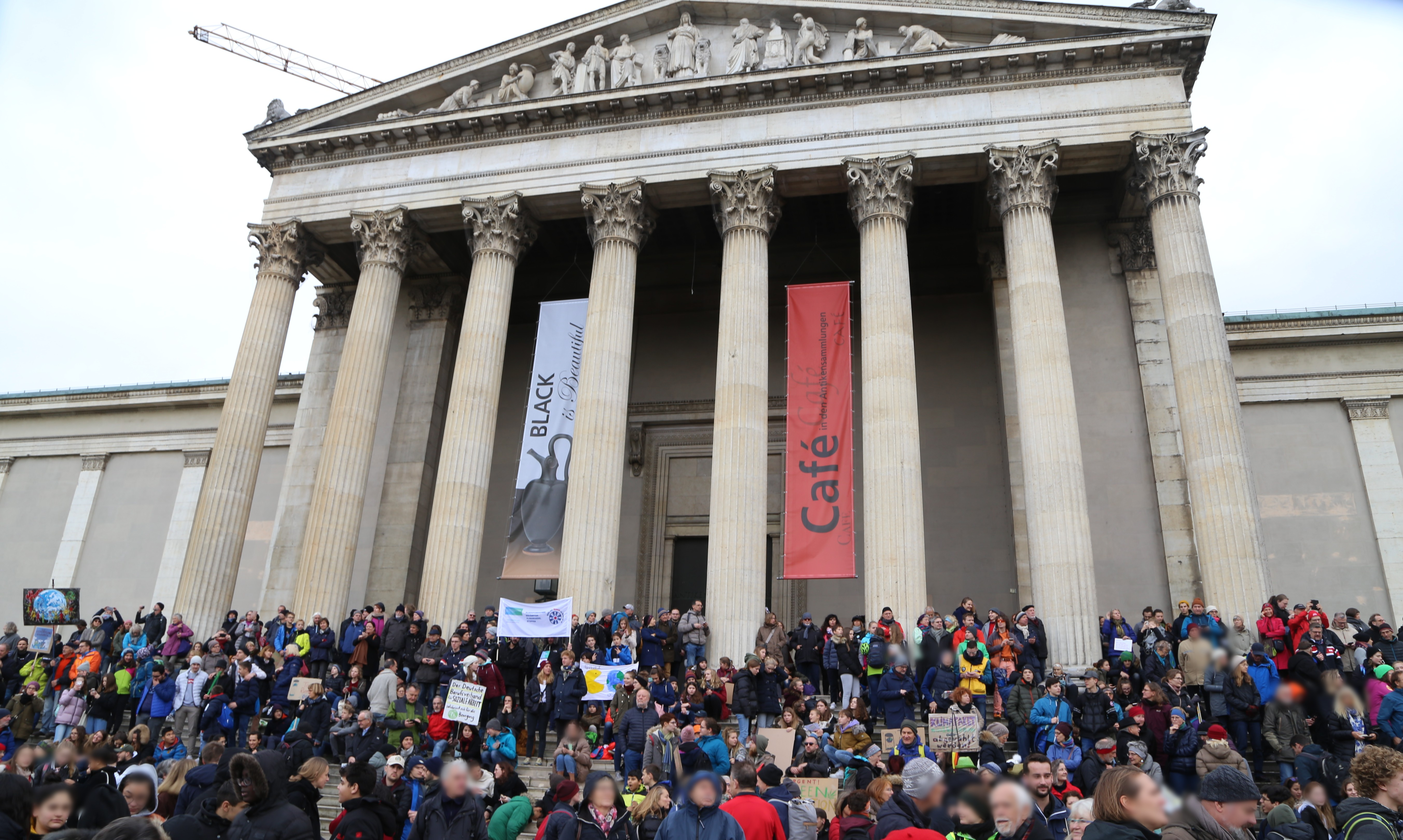 Globaler Klimastreik am Königsplatz in München am 29. November 2019